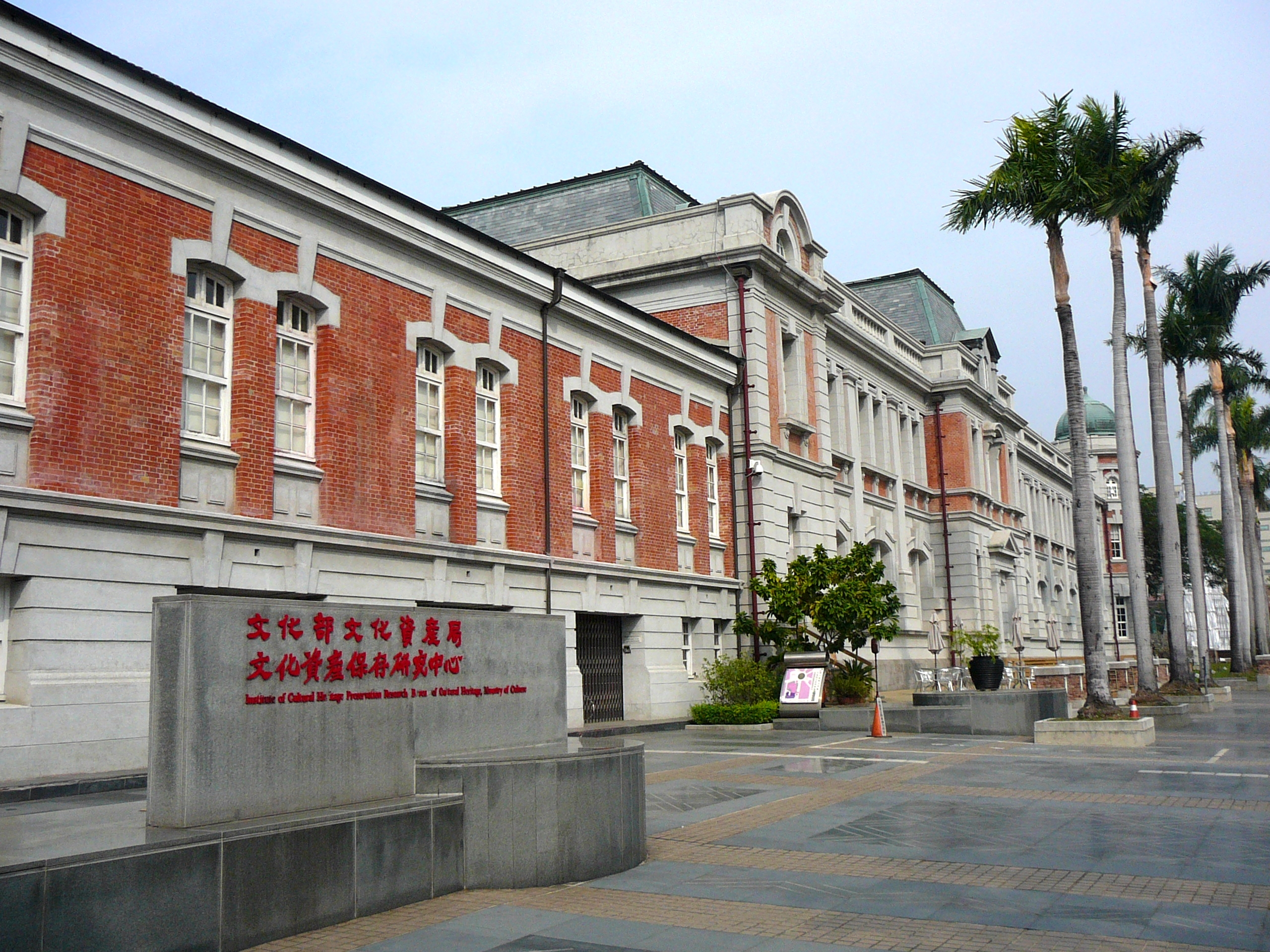 文化部文化資產局文化資產保存研究中心，位於原臺南州廳側廊。